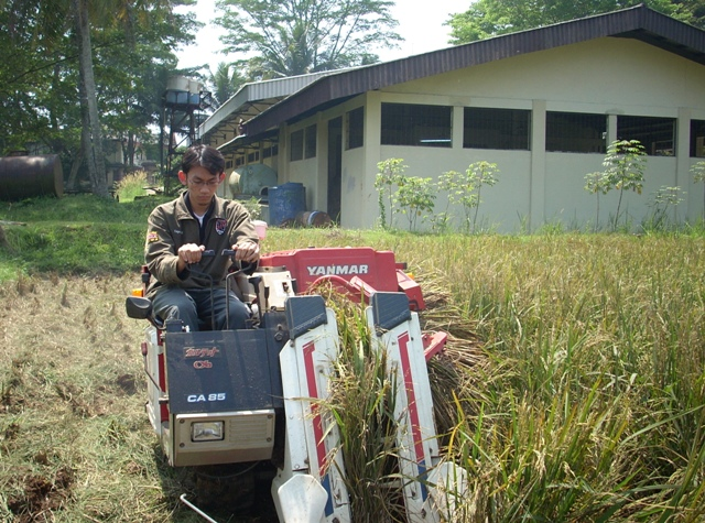 mesin pemanen padi pada lahan kering